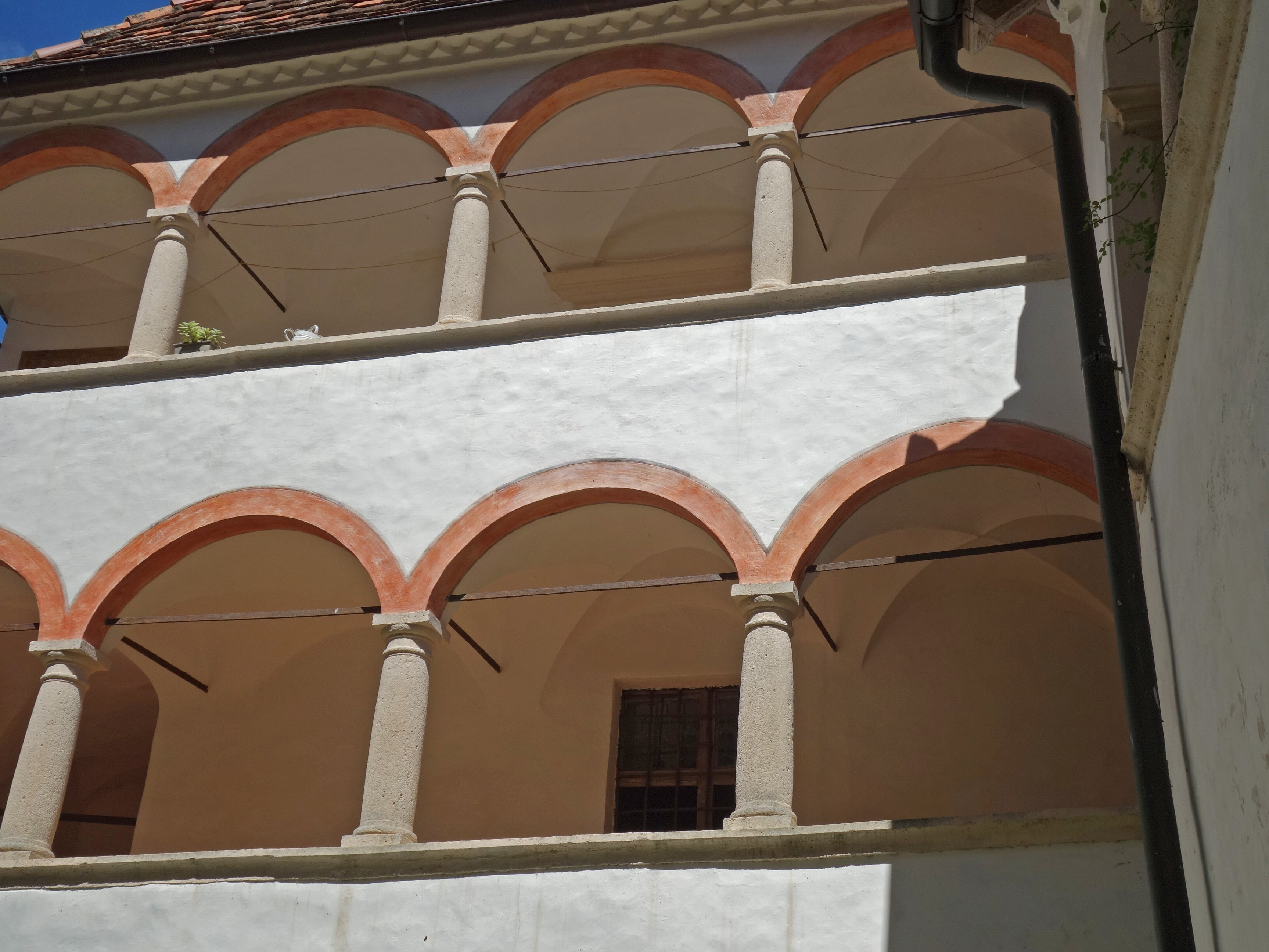 Der Innenhof von Schloss Feistritz (16. Jh.)